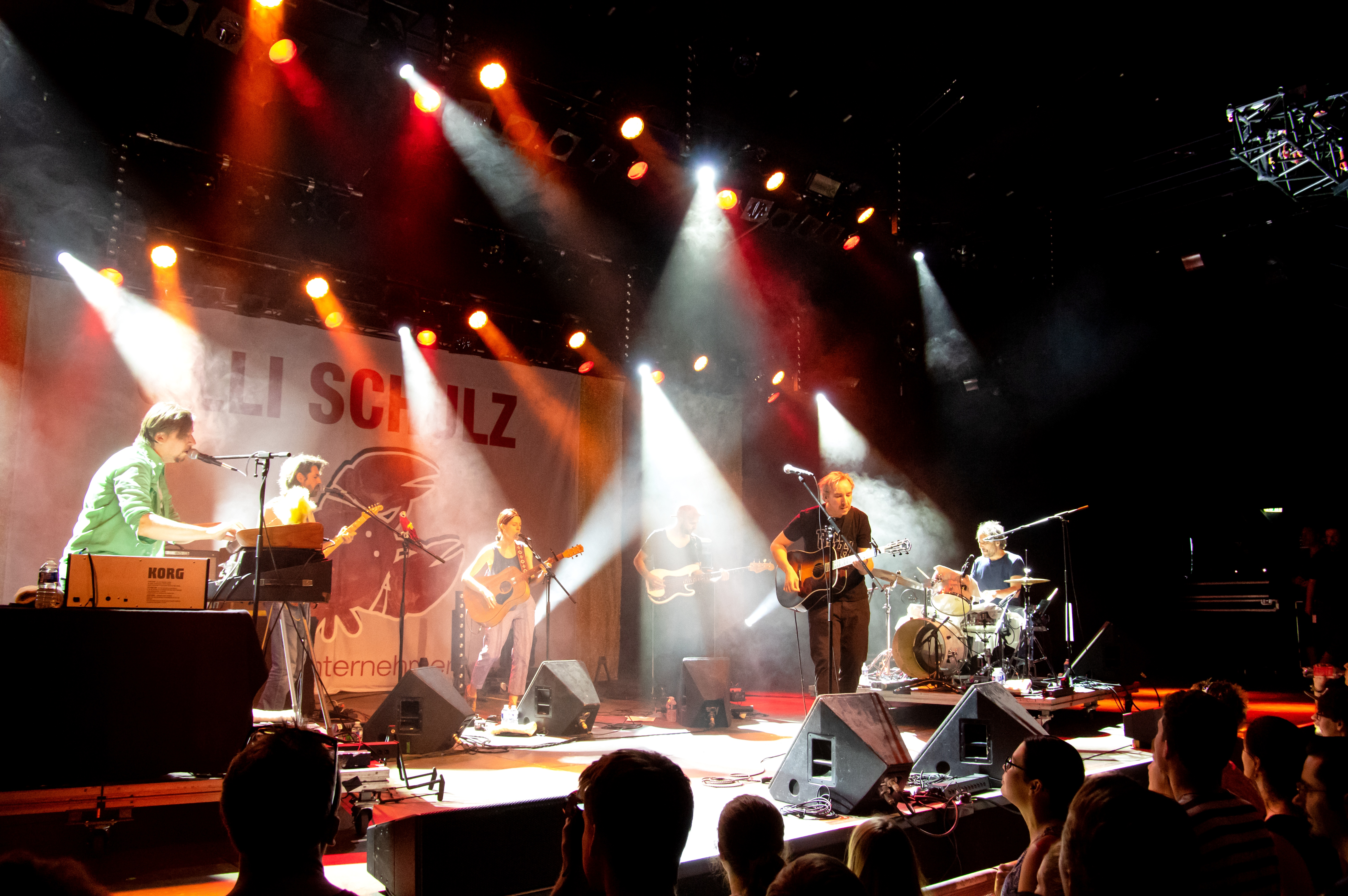 Bilder vom Zelt Musik Festival 2018 in Freiburg im Breisgau Auftritt Olli Schulz am 19. Juli 2018 im Zirkuszelt